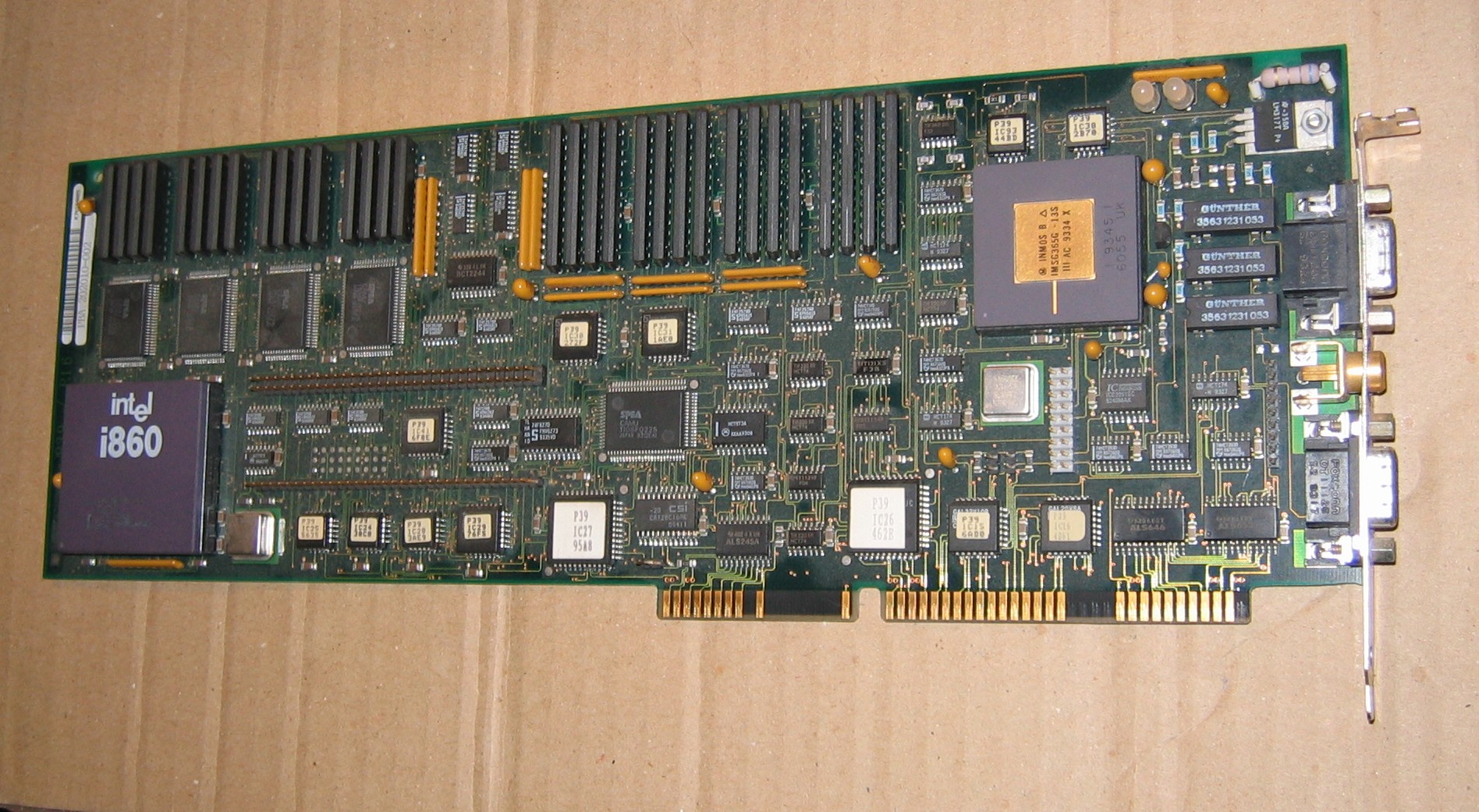 Eine Tiga High-End-Grafikkarte